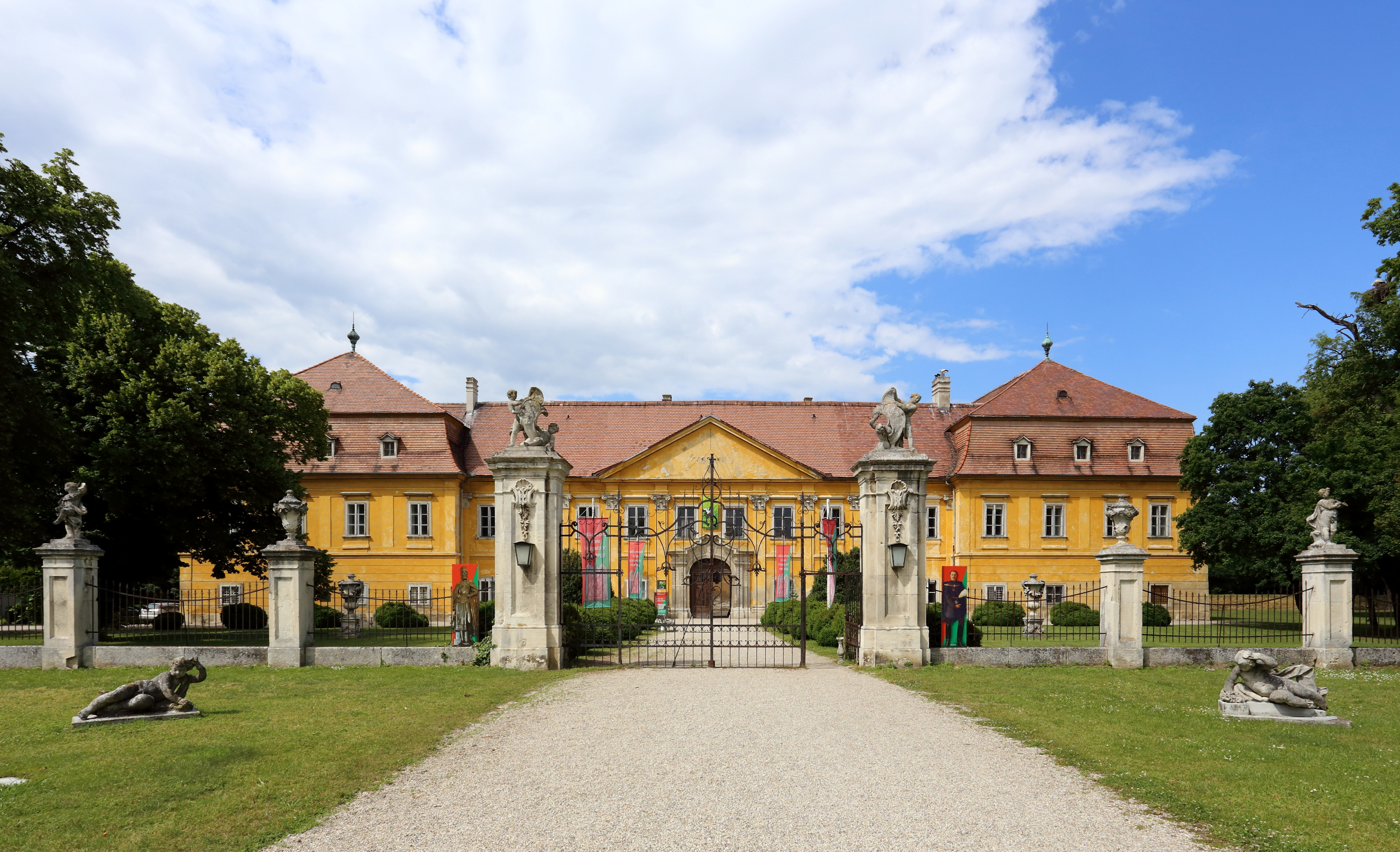 Die Hauptfassade des niederösterreichischen Schlosses Marchegg im Marchfeld. Der durchgehend zweigeschoßige und in einem großen Park liegende Bau wurde im 13. Jahrhundert als Wasserburg erbaut, in der Barockzeit umgebaut und als Jagdschloss verwendet.